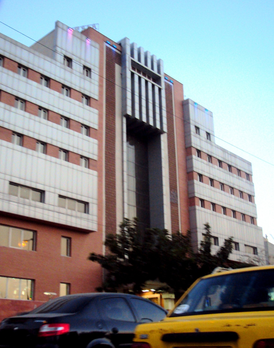 هتل پارسیا